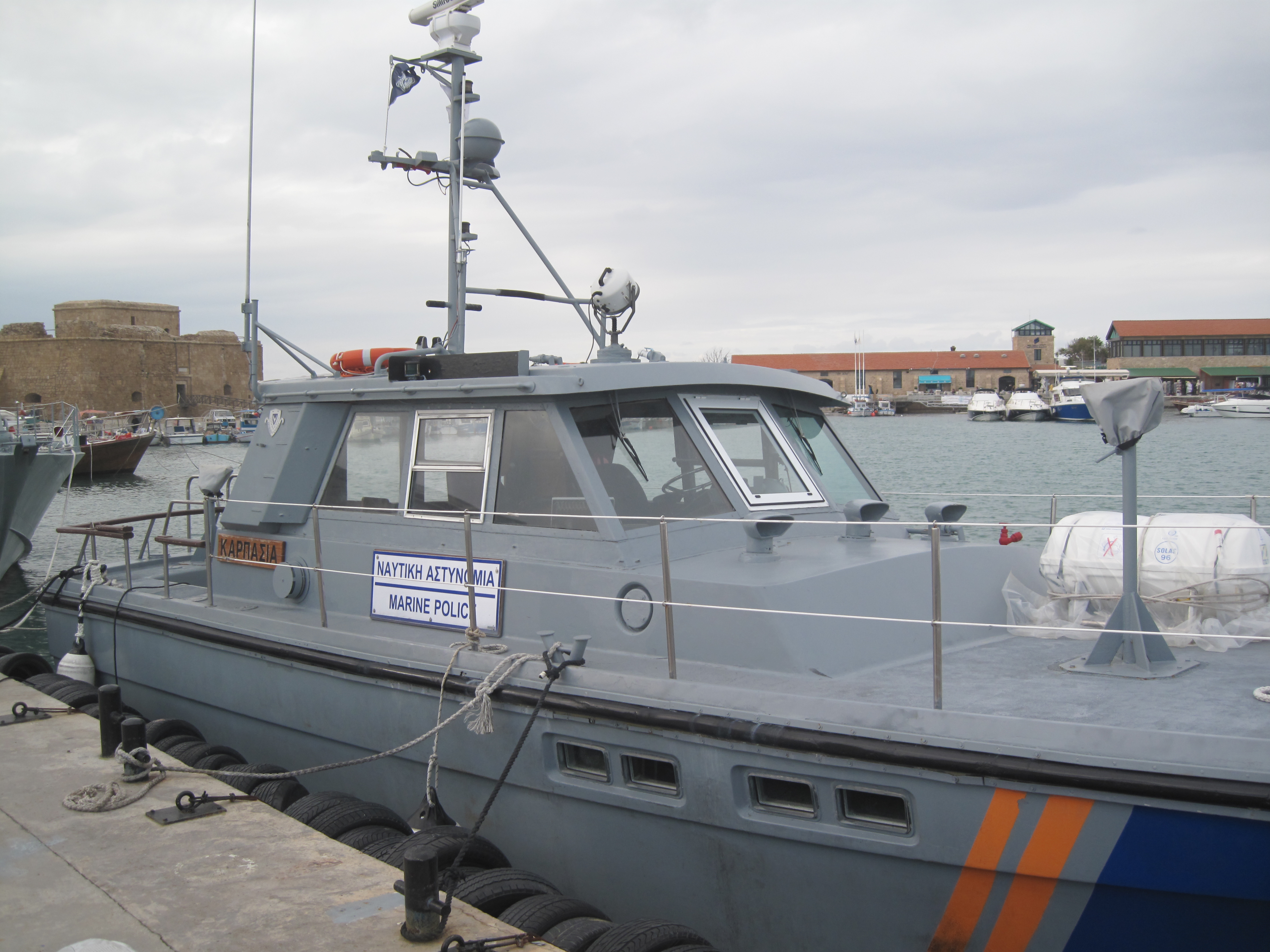 politieboot van Cyprus